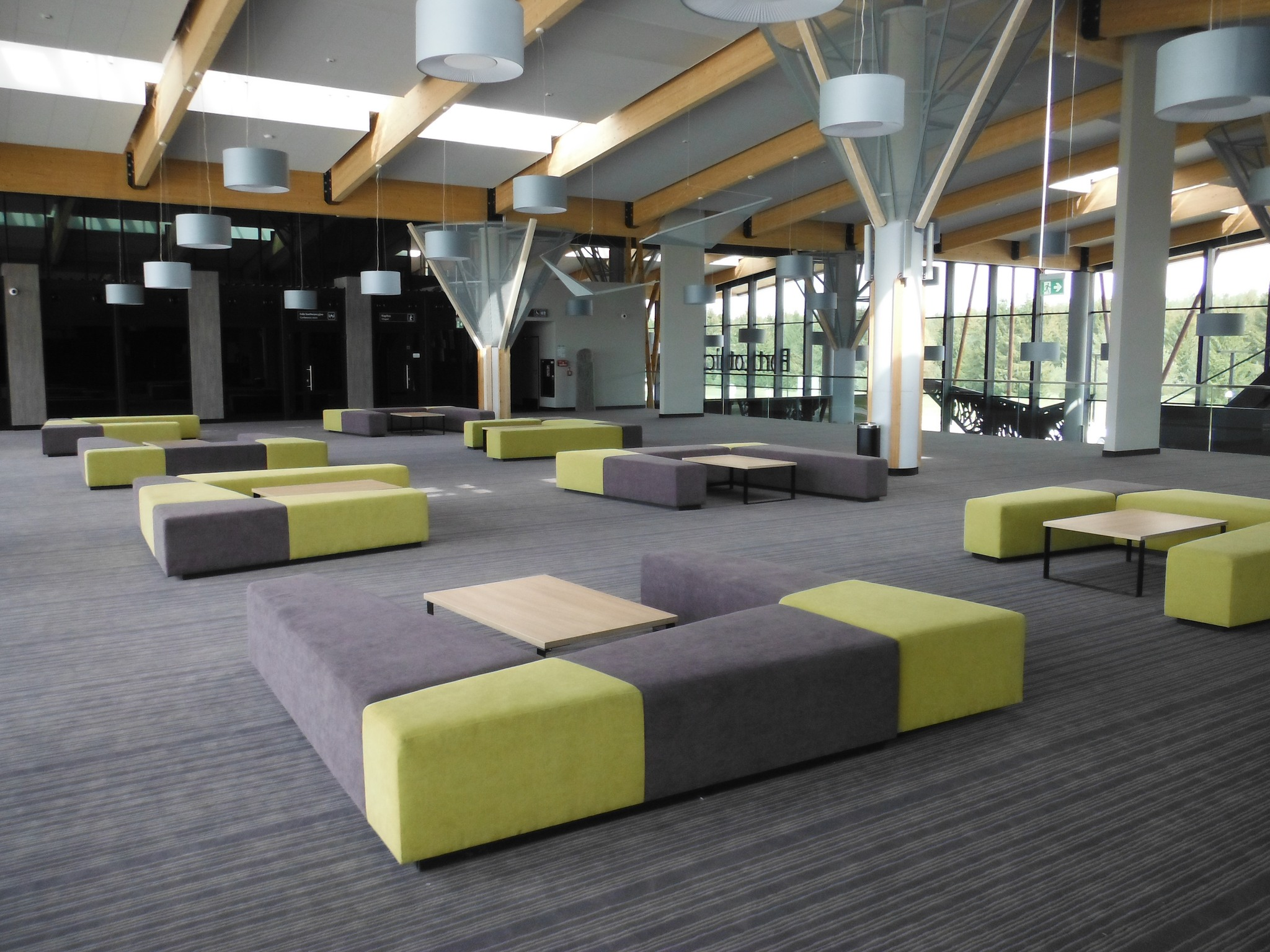 Port lotniczy Olsztyn-Mazury.